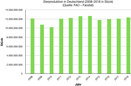 Quelle: FAO (Faostat)